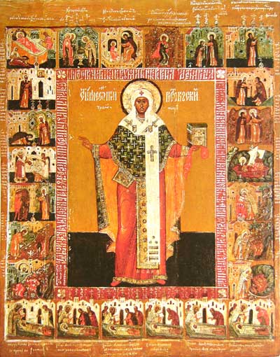 Леонтий Ростовский с житием в 24 клеймах. Ок. 1677 г. 100 × 78 см. Муромский историко-художественный музей, Муром, Россия. Инв. М-6674.